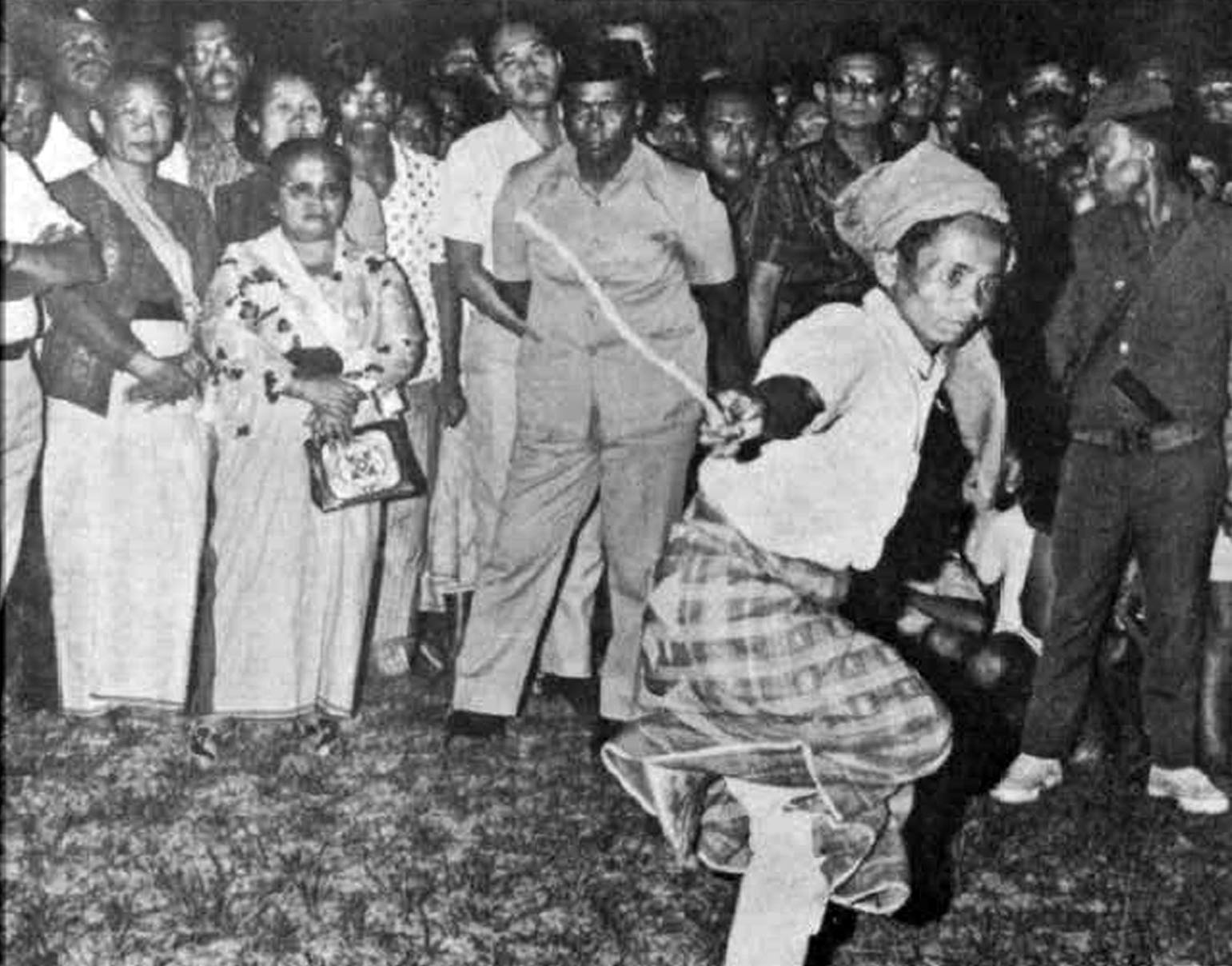 Peulebat Seni Bela diri dari Aceh Tenggara